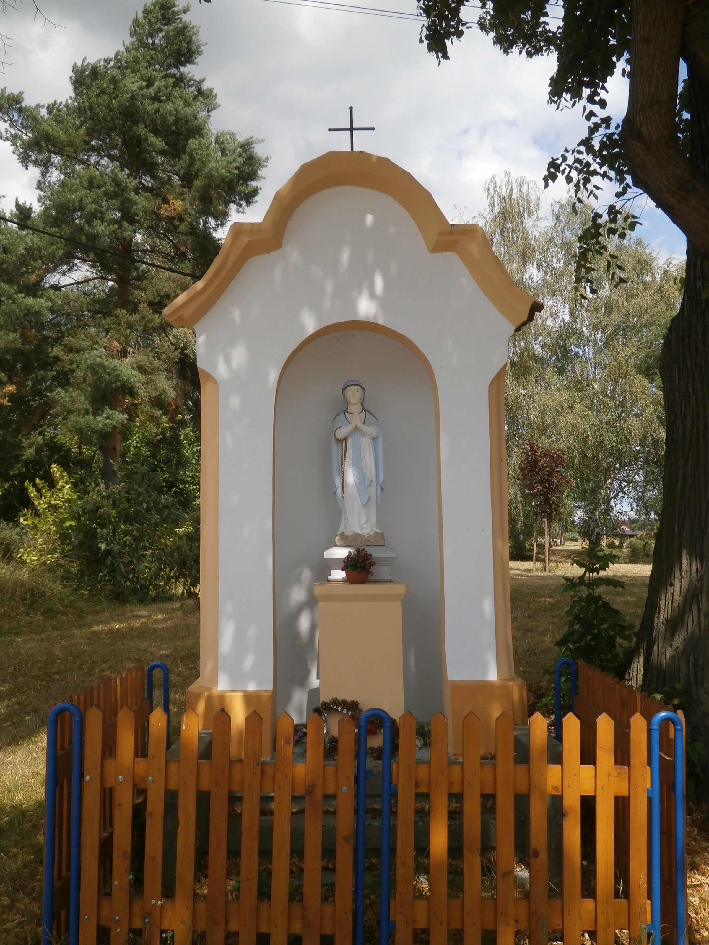 Rohatsko - kaplička P. Marie, postavená kolem roku 1830